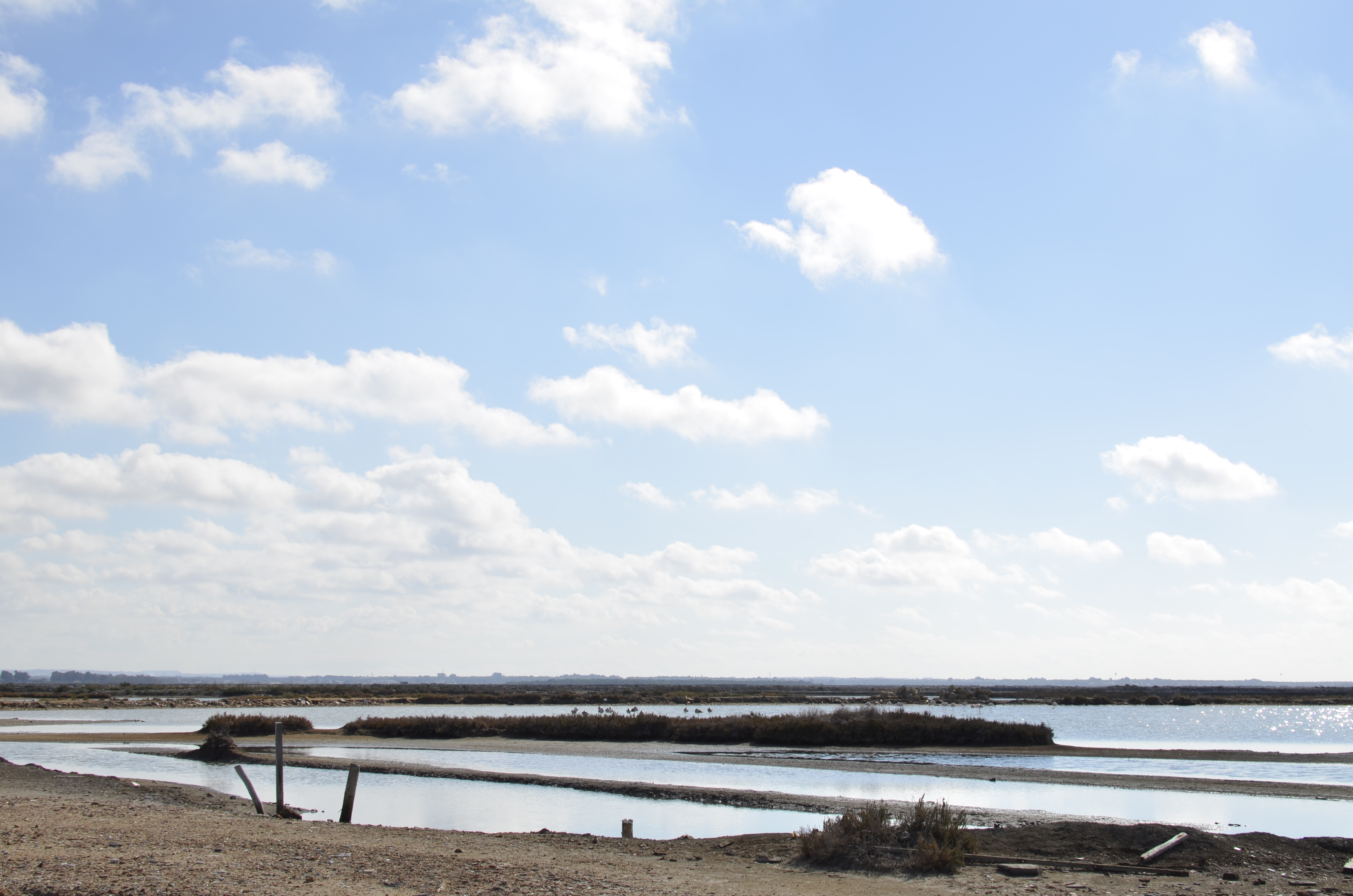 Parque natural de la Bahía de Cádiz This is a photography of a Site of Community Importance in Spain with the ID: ES0000140. Natura2000 entry, EEA entry